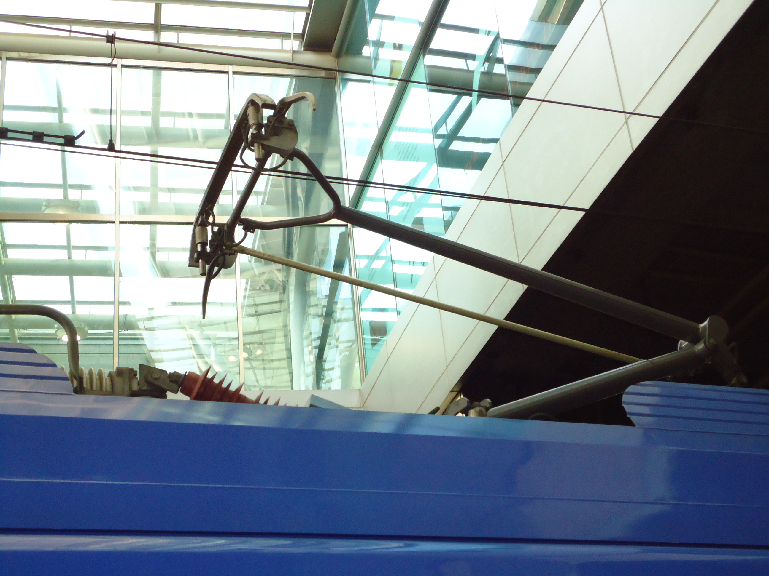 KTX-산천 팬터그래프